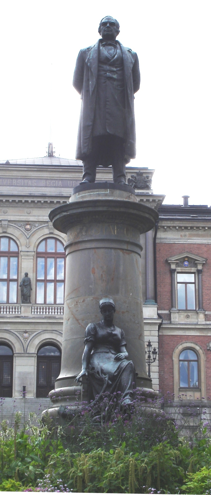 staty av Erik Gustaf Geijer